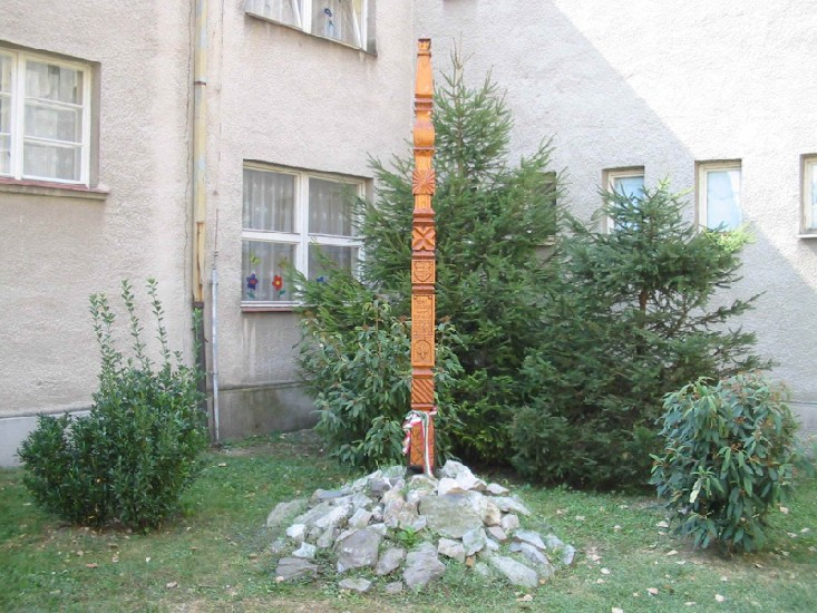 == Licenc: ==